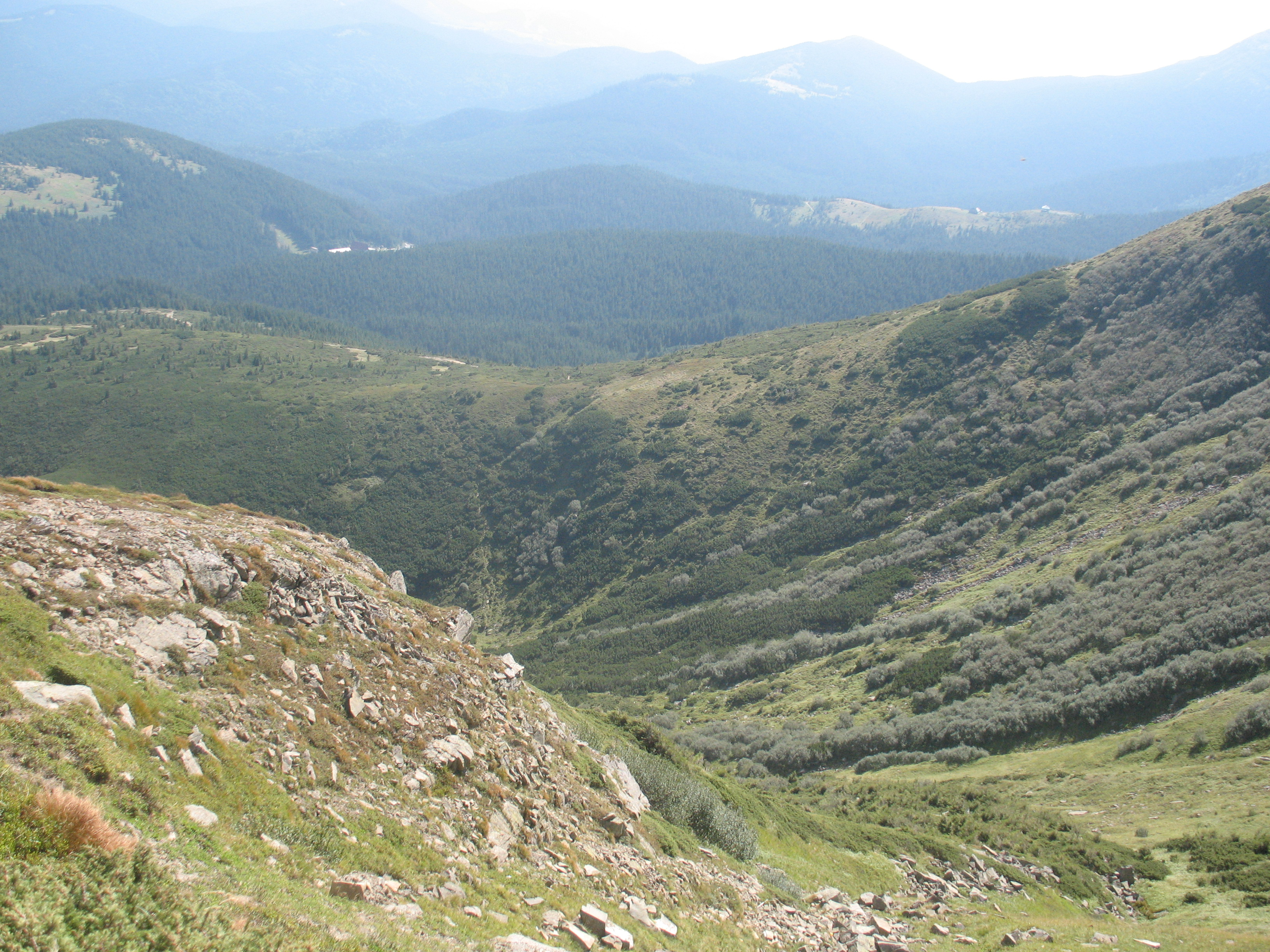 Спуск з гори Говерла